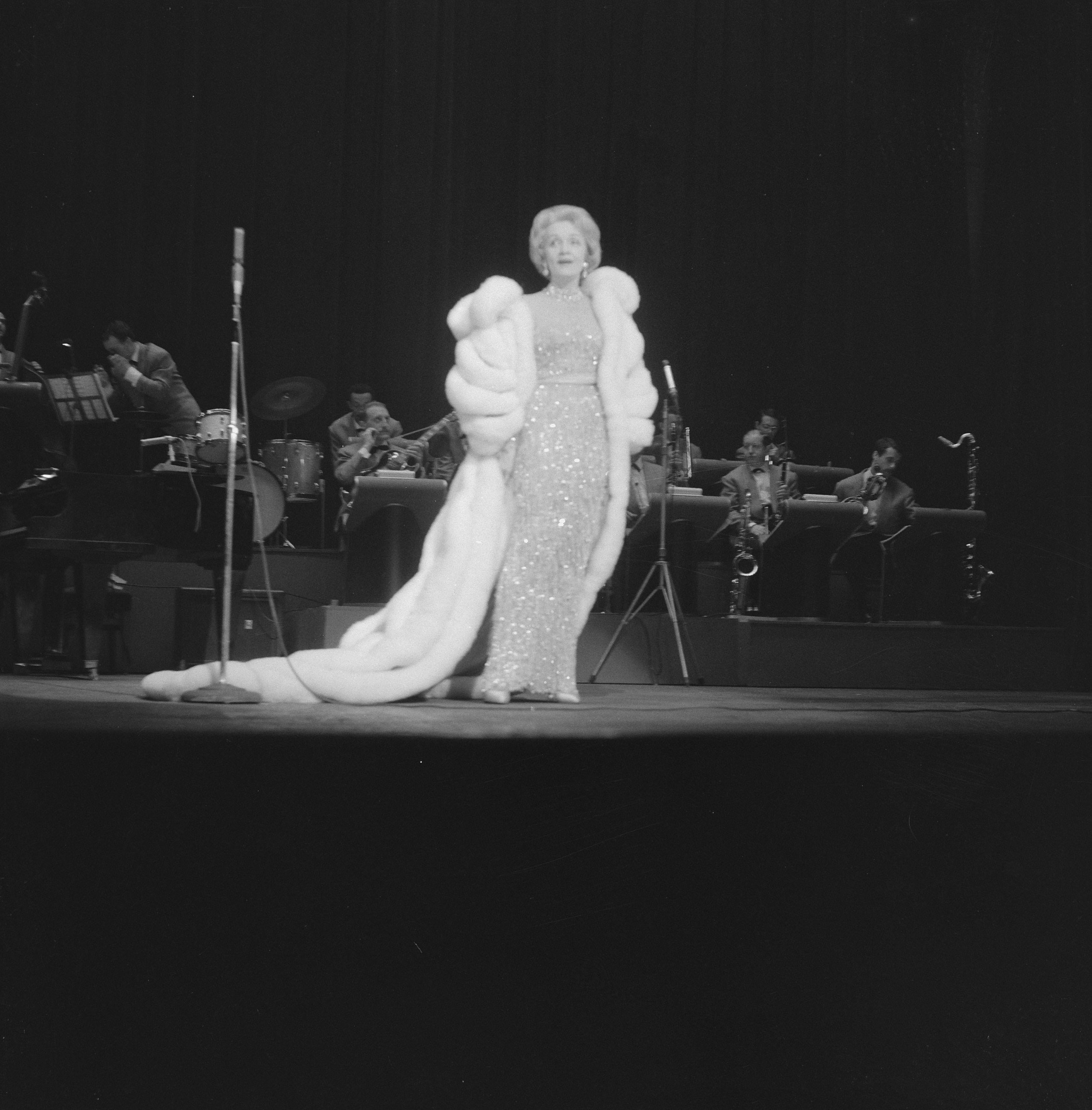 Collectie / Archief : Fotocollectie Anefo Reportage / Serie : [ onbekend ] Beschrijving : Nachtoptreden van Marlene Dietrich in het Tuschinkitheater te Amsterdam Datum : 28 mei 1960 Locatie : Amsterdam, Noord-Holland Trefwoorden : actrices, filmsterren, theater, voorstellingen, zangeressen Persoonsnaam : Dietrich Marlene Fotograaf : Lindeboom, Henk / Anefo Auteursrechthebbende : Nationaal Archief Materiaalsoort : Negatief (zwart/wit) Nummer archiefinventaris : bekijk toegang 2.24.01.03 Bestanddeelnummer : 911-2853